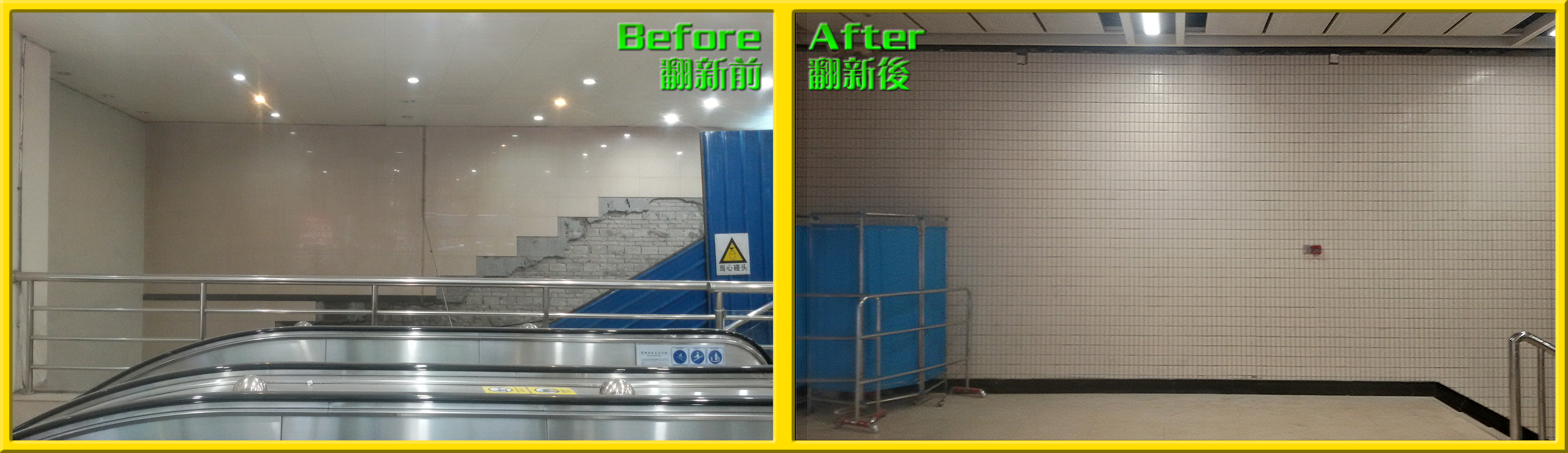 粵語: 喺2018年1月底，廣州地鐵1號綫西門口站A同D出入口嘅牆面裝飾變化。